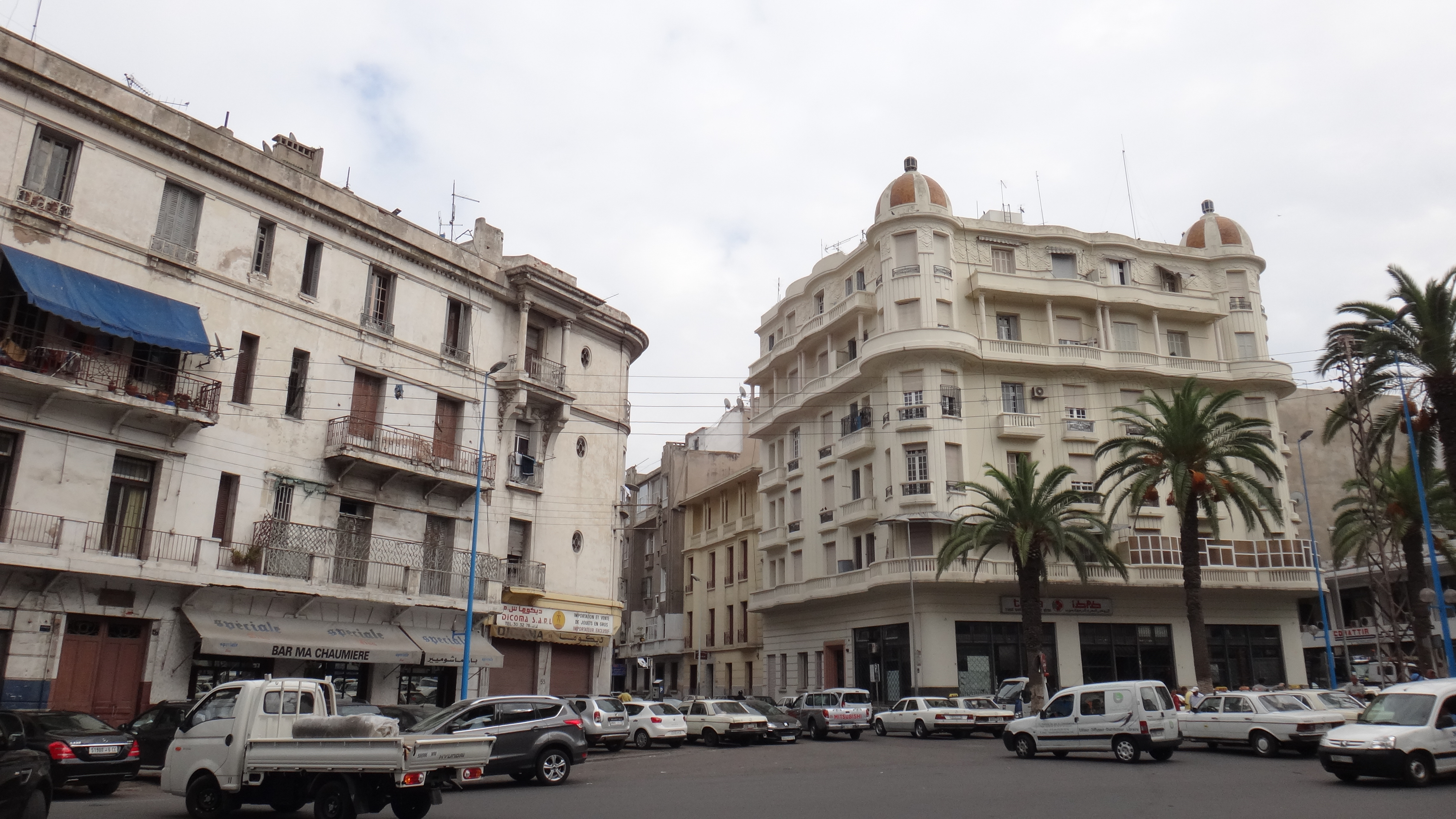 Casablanca 20000, Morocco